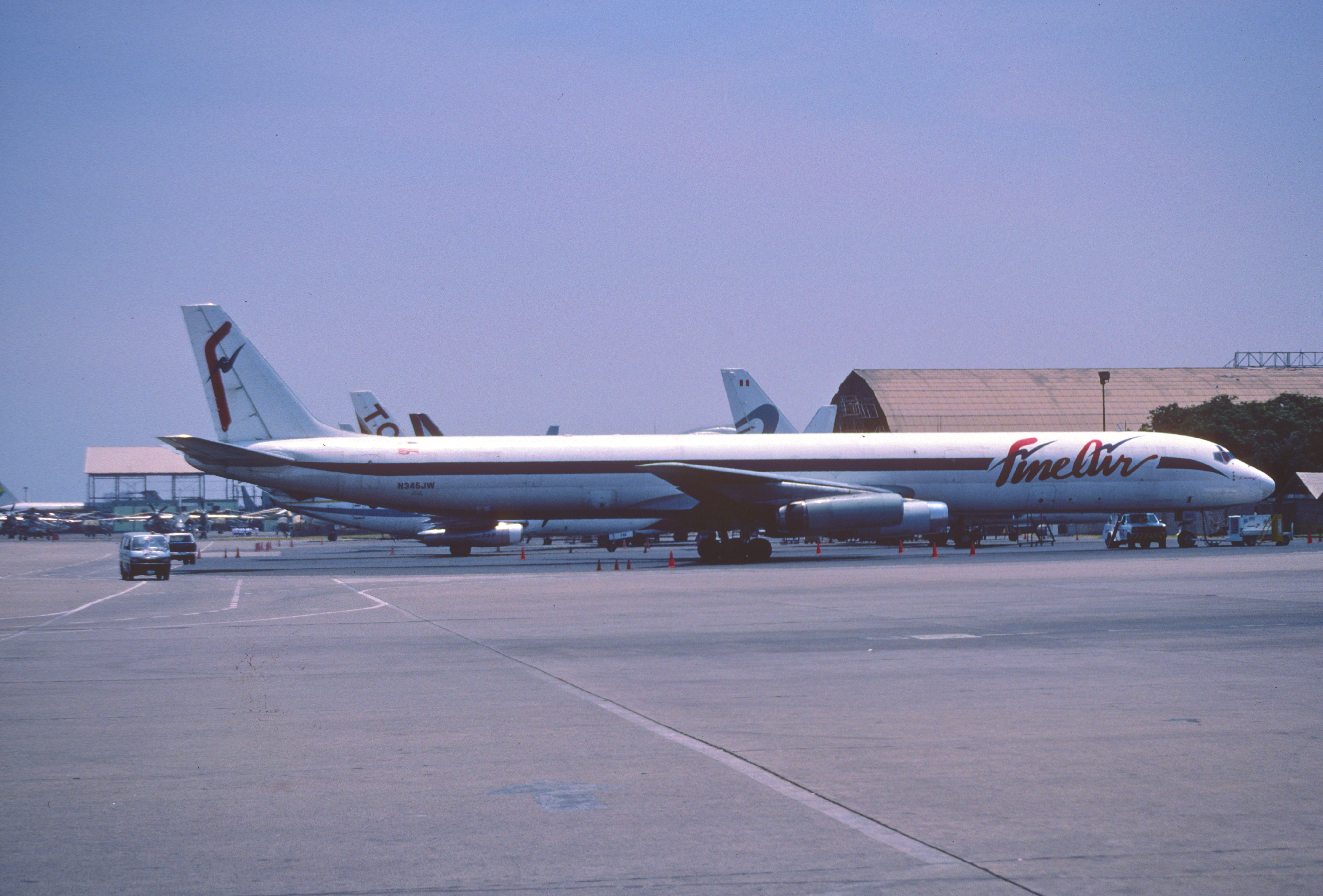 170ai - Fine Air DC-8-63F; N345JW@LIM;11.03.2002